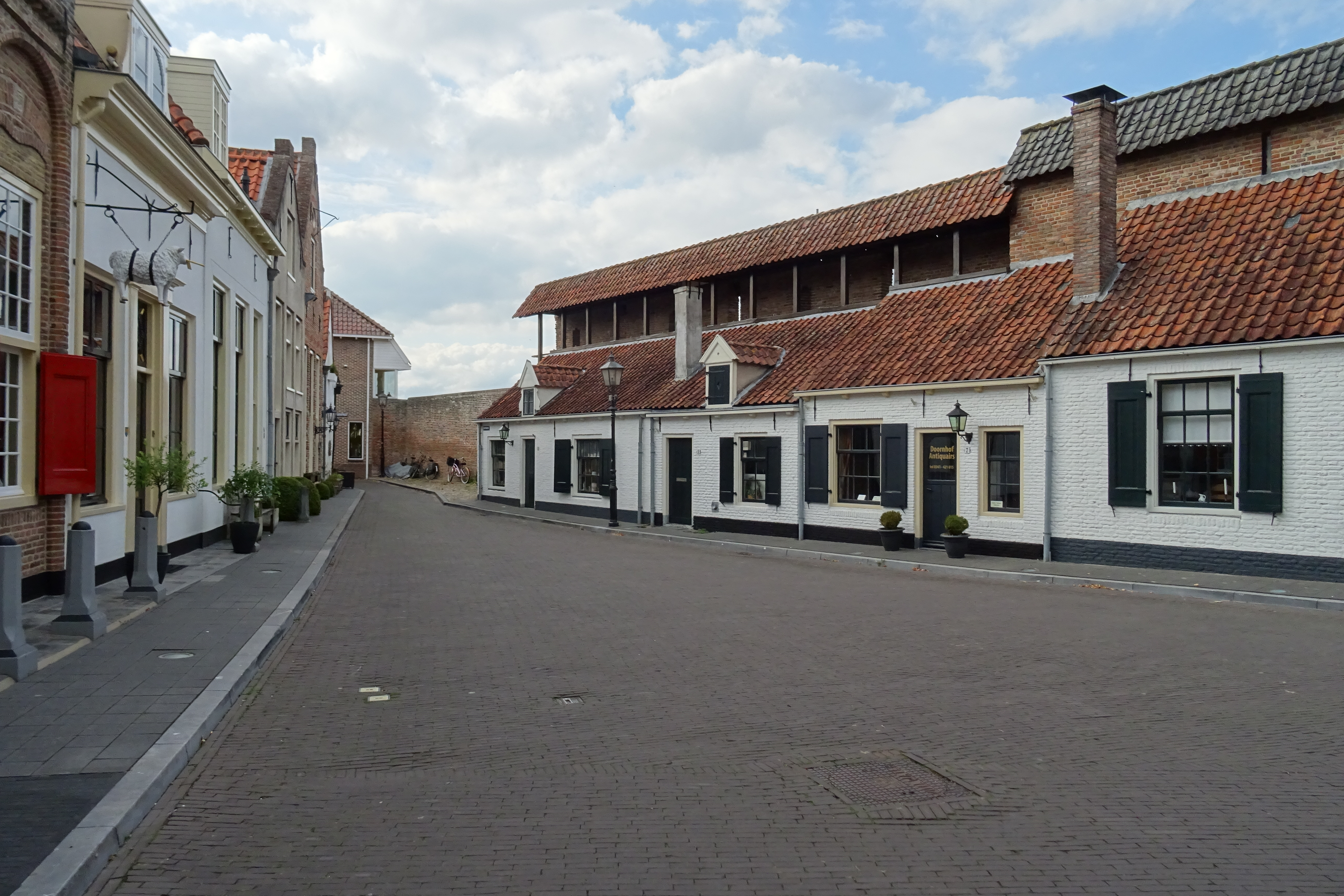 Schapenhoek Harderwijk 2018